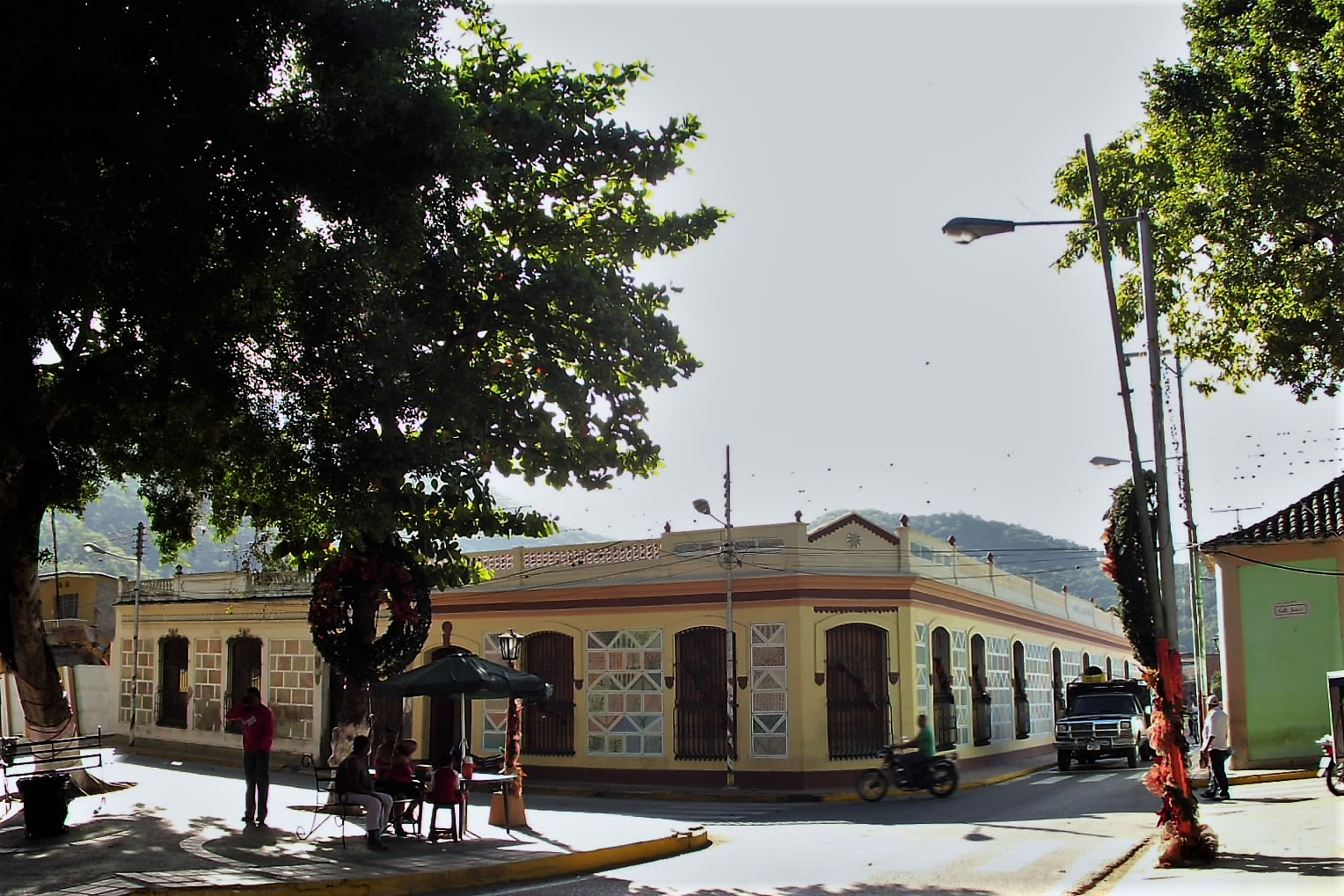 La Casa de la Cultura es una edificación autóctona Colonial en el centro de Ocumare